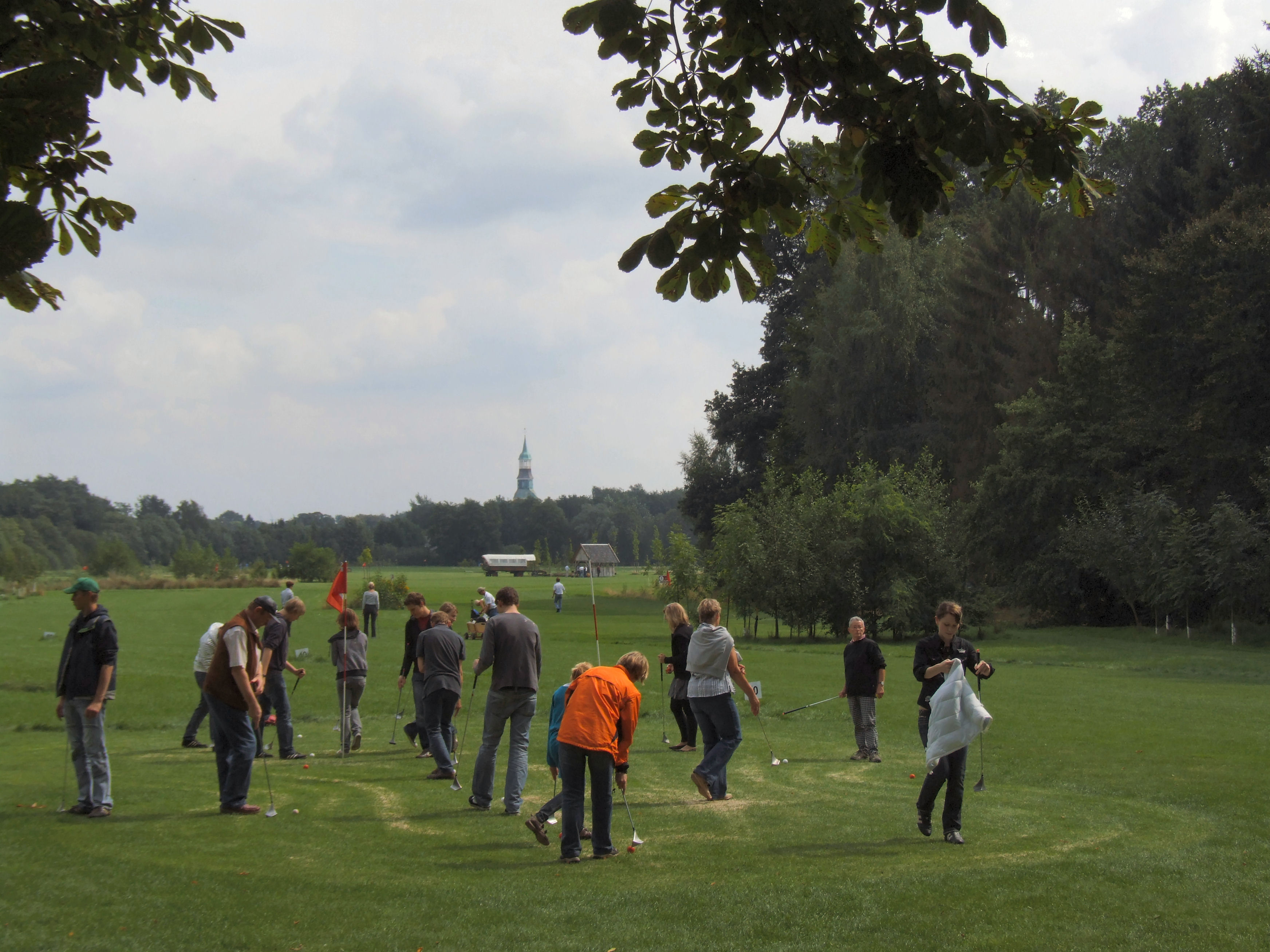 Swingolf auf Gut Vehr, Quakenbrück